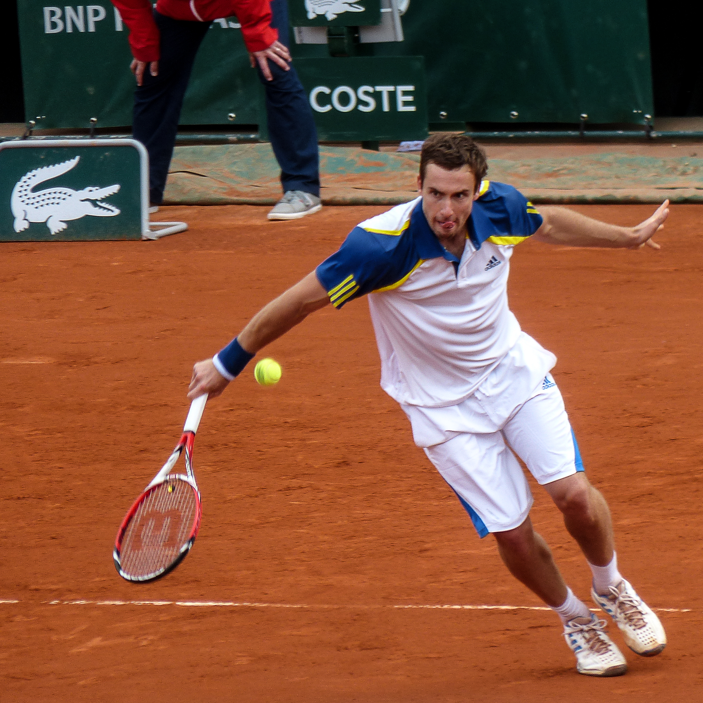 2ème tour Roland Garros 2013 : Gael Monfils (FRA) def. Ernests Gulbis (LAT)